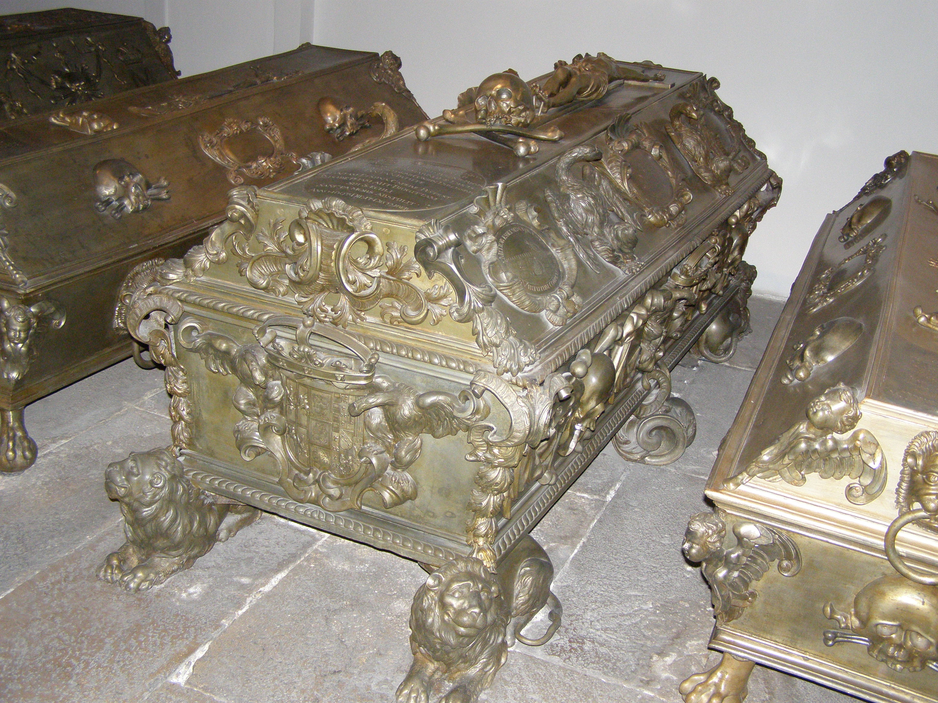 Sarkofag Eleonory Habsburżanki w krypcie kościoła Kapucynów w Wiedniu